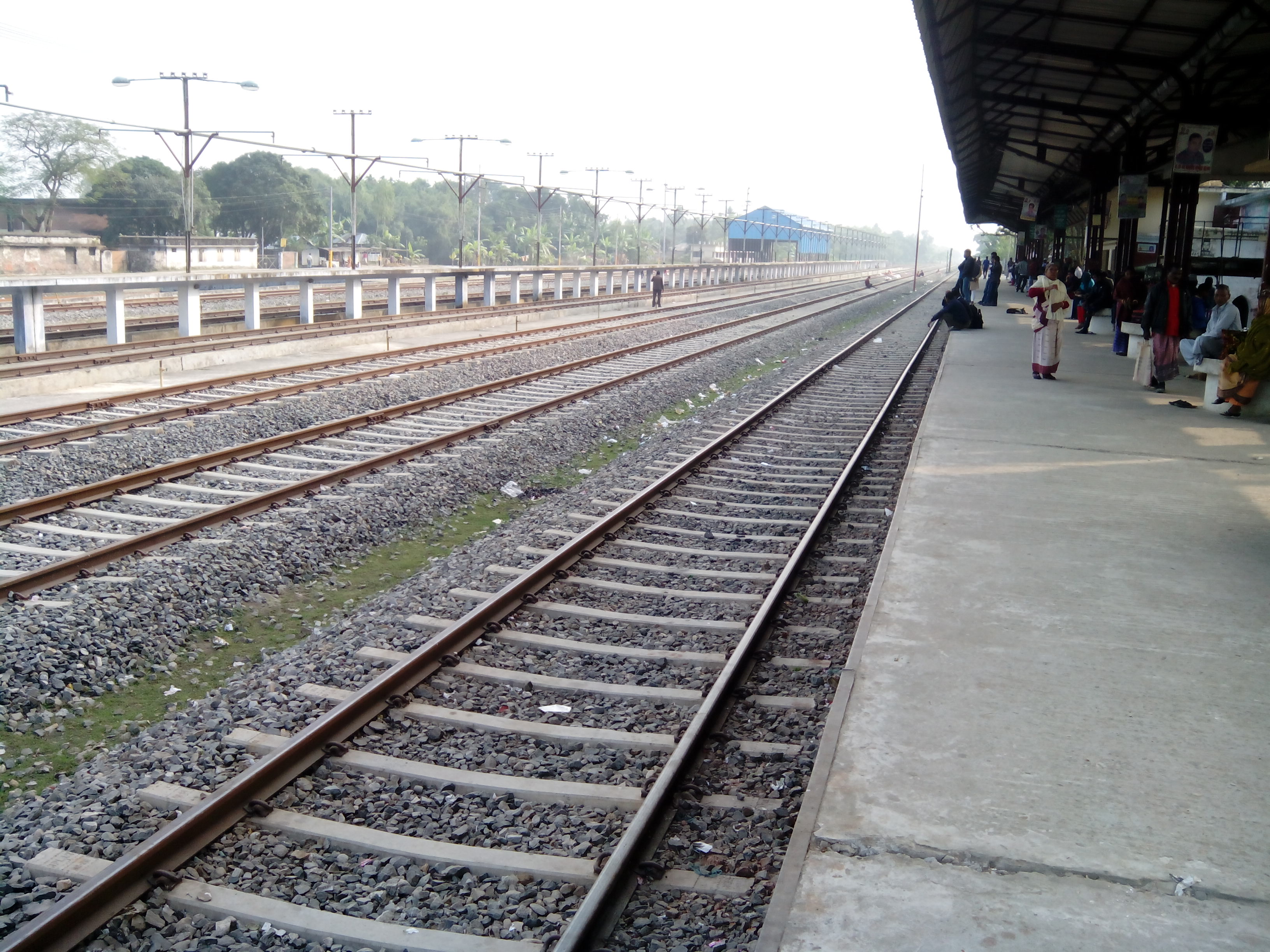 চিলাহাটি রেলওয়ে স্টেশন